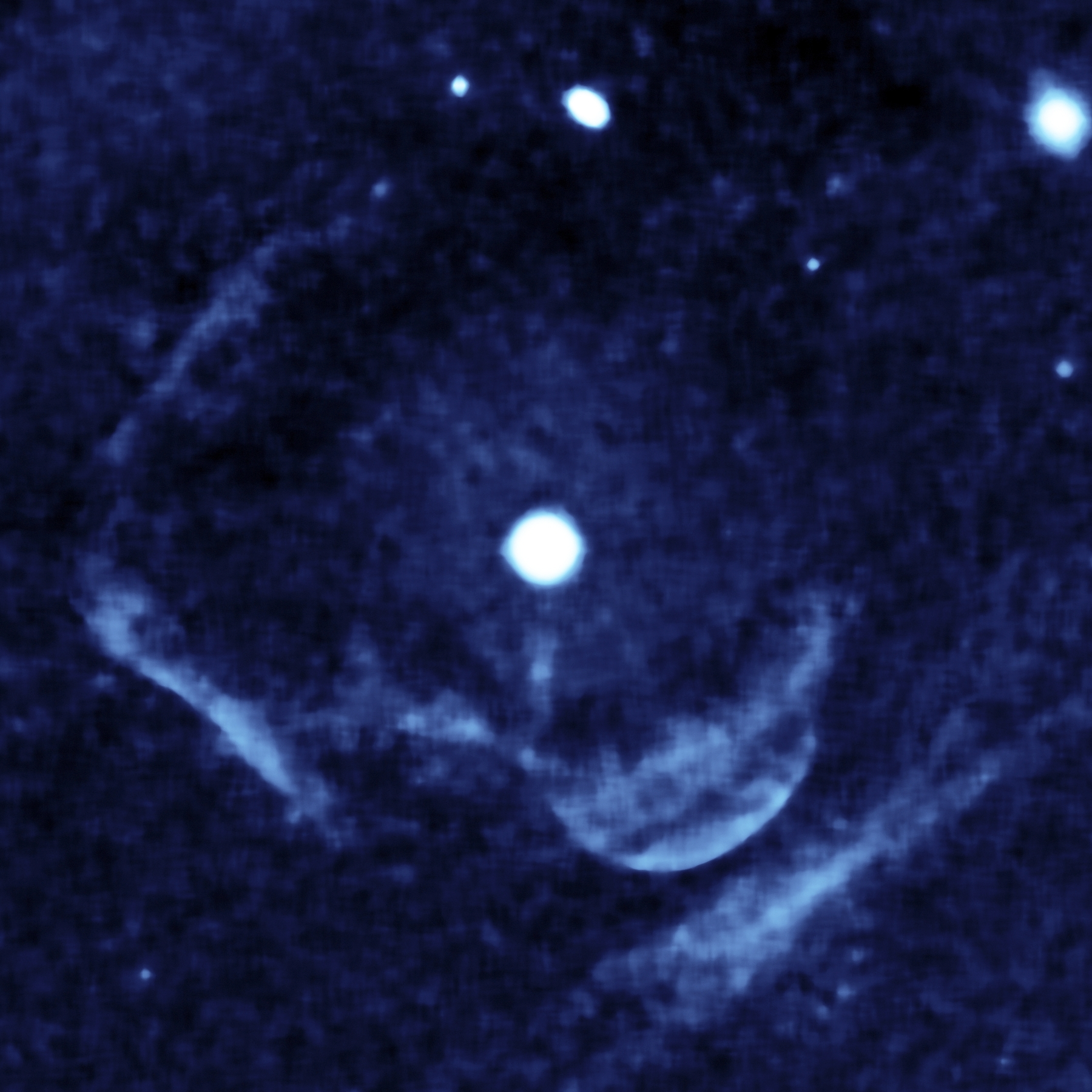 Z Camelopardalis dwarf nova in ultraviolet